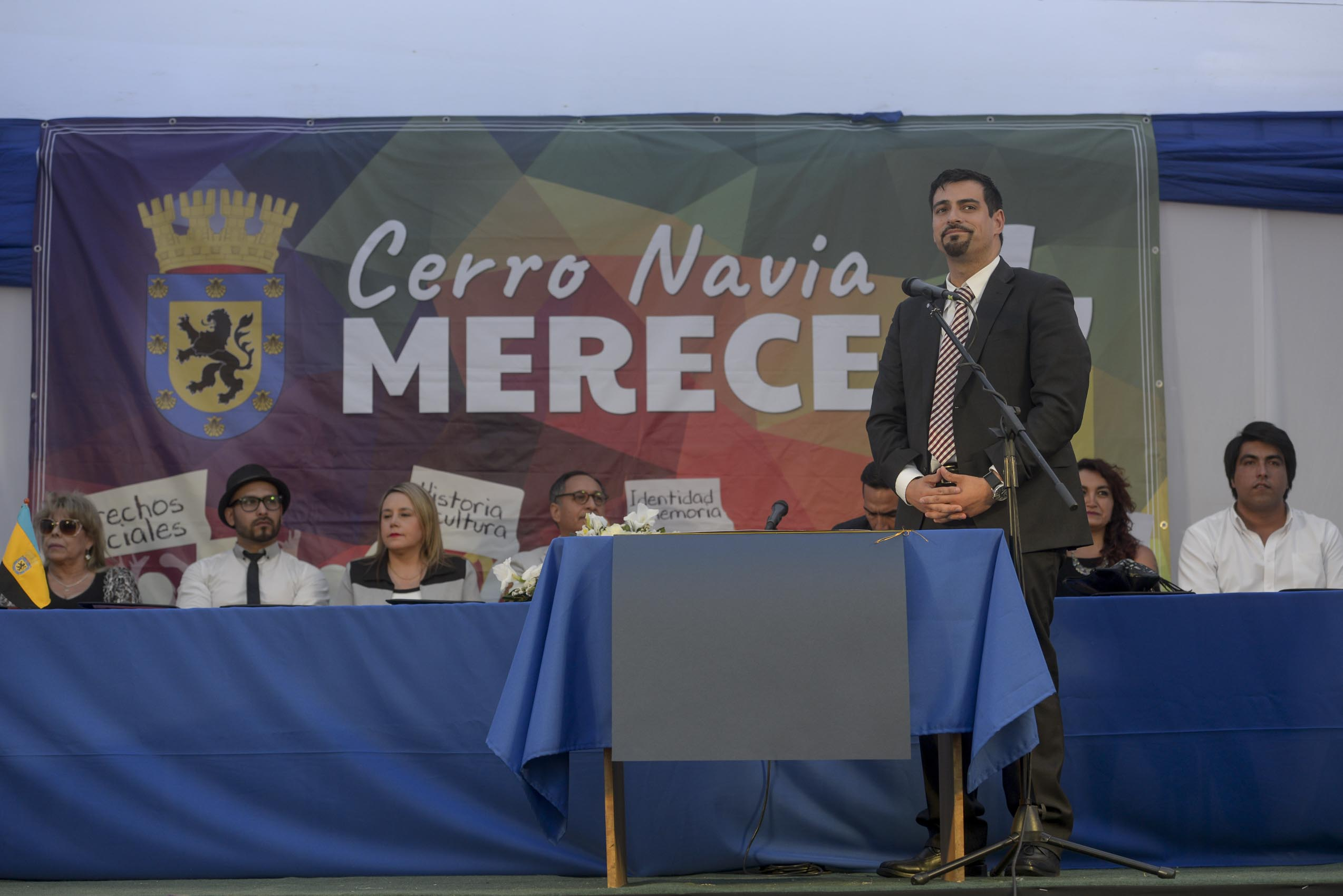 Ministra Narváez asiste a la ceremonia de cambio de Alcalde en Cerro Navia